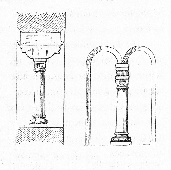 Bilder aus dem in derselben Kategorie befindlichen Artikel aus den Mittheilungen der kaiserl. königl. Central-Commission zur Erforschung und Erhaltung der Baudenkmale Band 1, 1856.